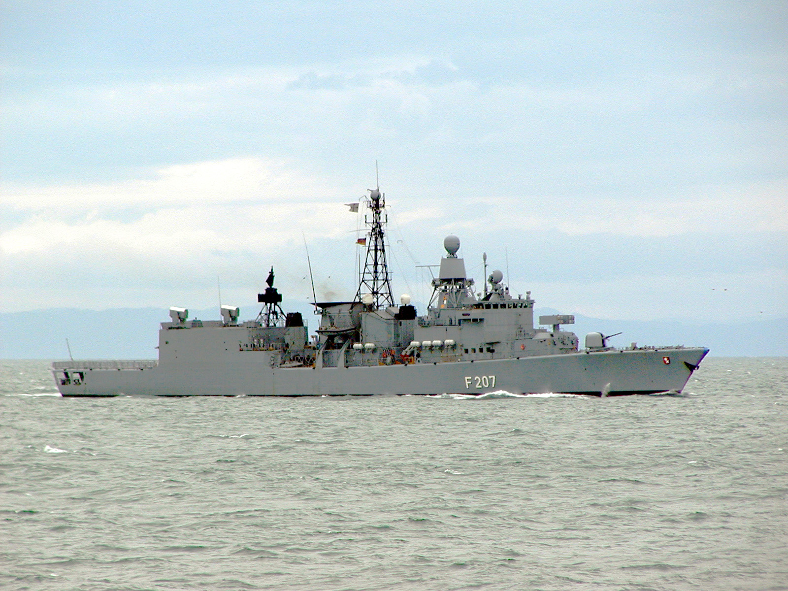 Fregatte Bremen, selber aufgenommen 2003, GNU-FDL